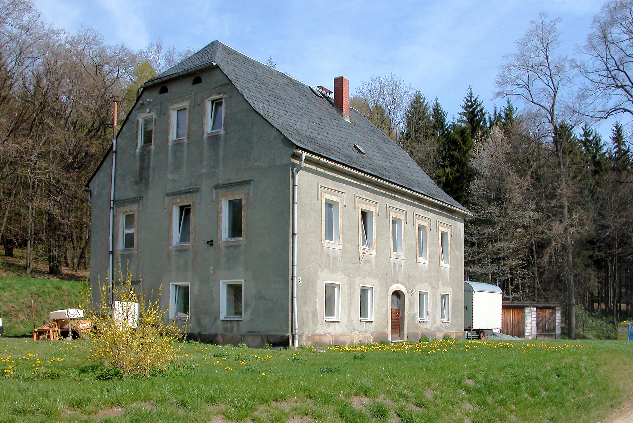 28.04.2008 02736 Picka (Oppach), Am Galgenberg 1 (GMP: 51.071495,14.481075): Herrenhaus, ehem. Vorwerk des Ritterguts Oppach, 1856 umgebaut zum Sommerhaus und Jagdsitz, "Schlössel" genannt. [DSCN32483.TIF]20080428220.JPG(c)Blobelt